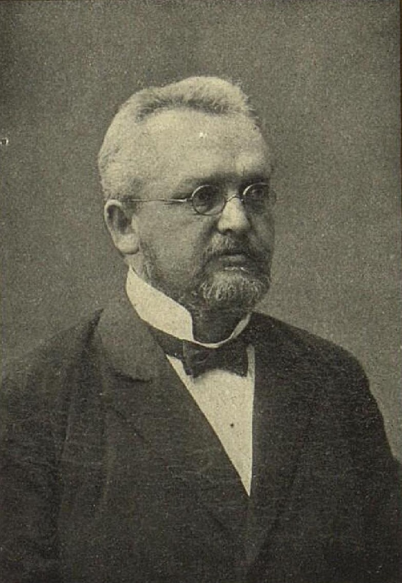 Alois Vrtal (1849-1916), rakouský a český advokát a politik